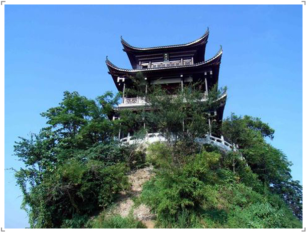 石鼓山合江亭